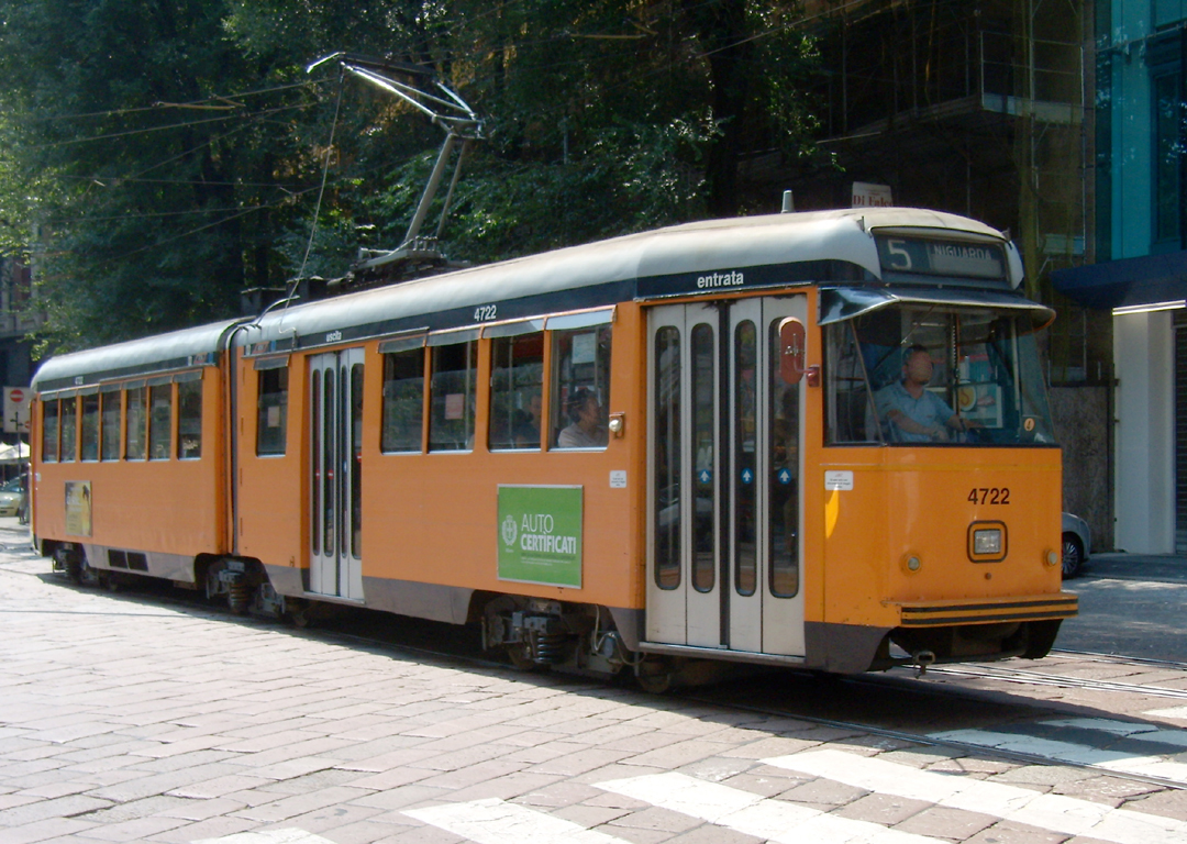 Vettura 4722 (tram serie 4700) dell’ATM di Milano in servizio sulla linea 5 diretta a Niguarda, in piazza IV Novembre il 31 luglio 2009.